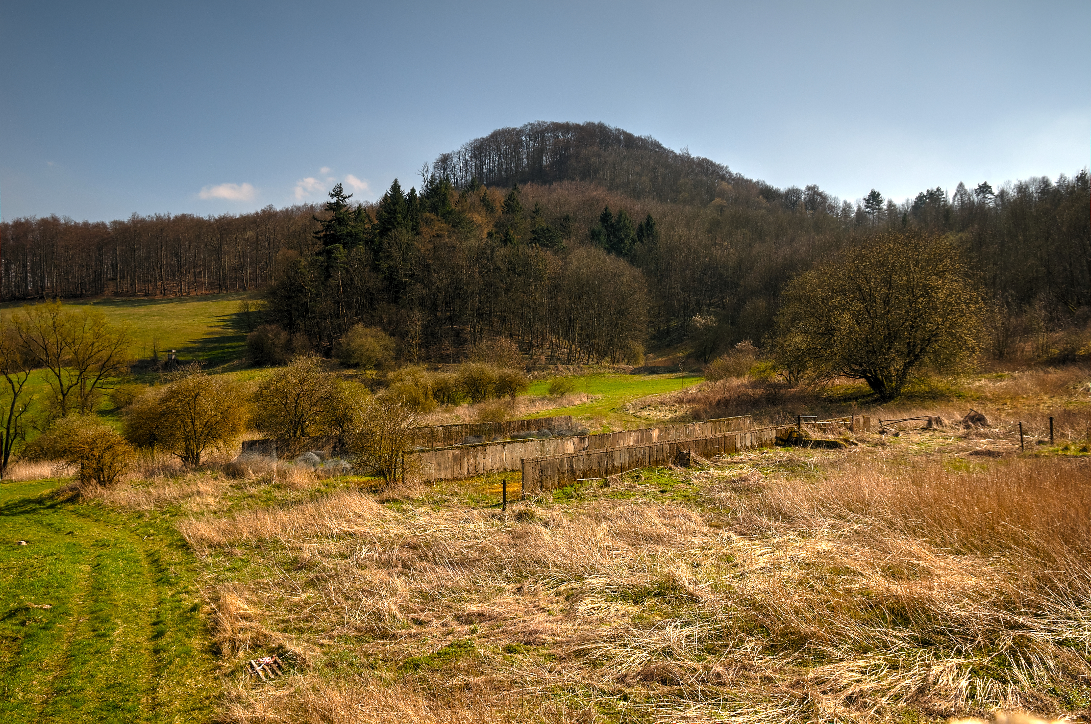 Gut-Keudelstein (geschleift) unter der Keudelskuppe